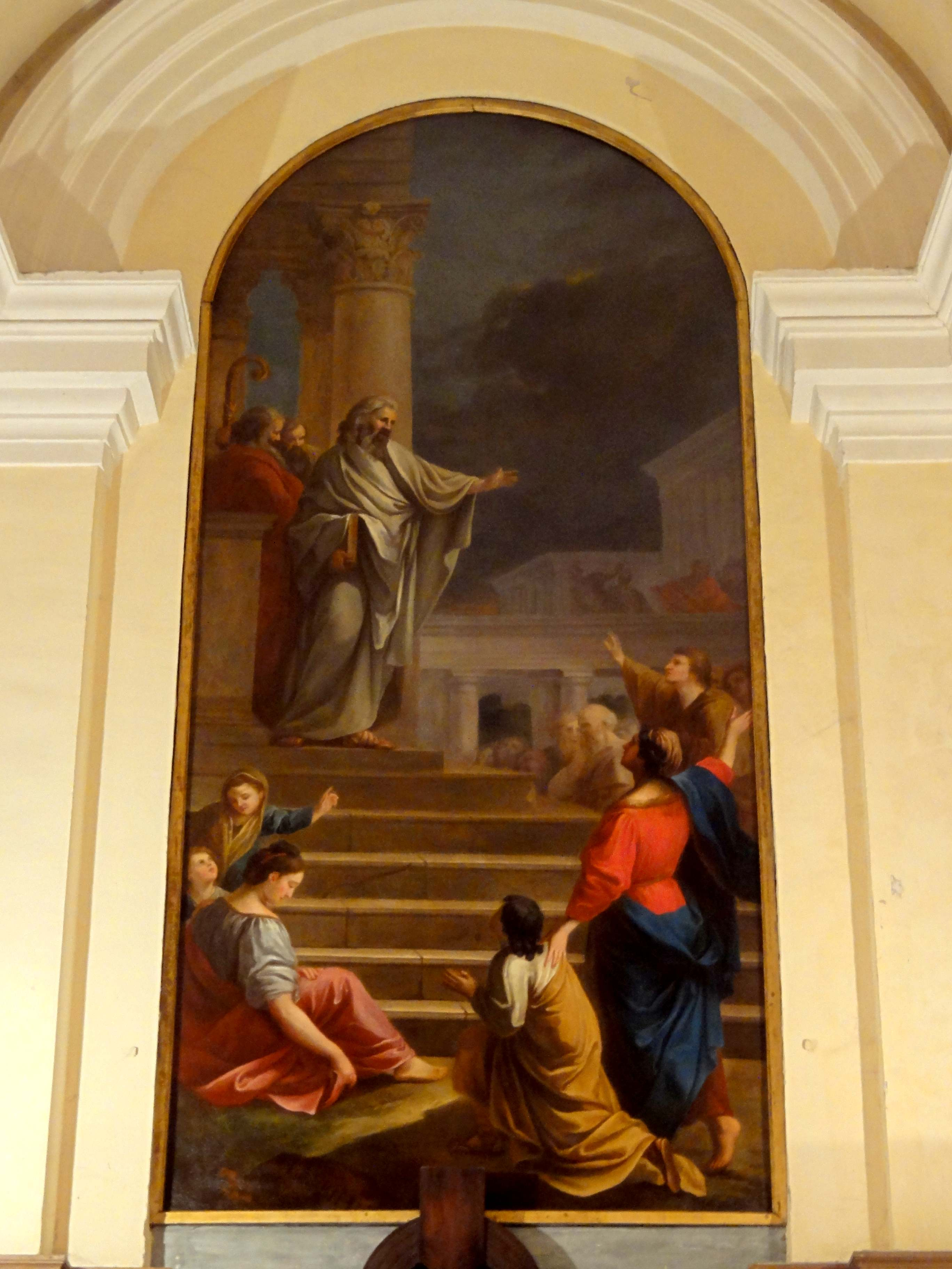 Mobilier de l'église - voir titre.